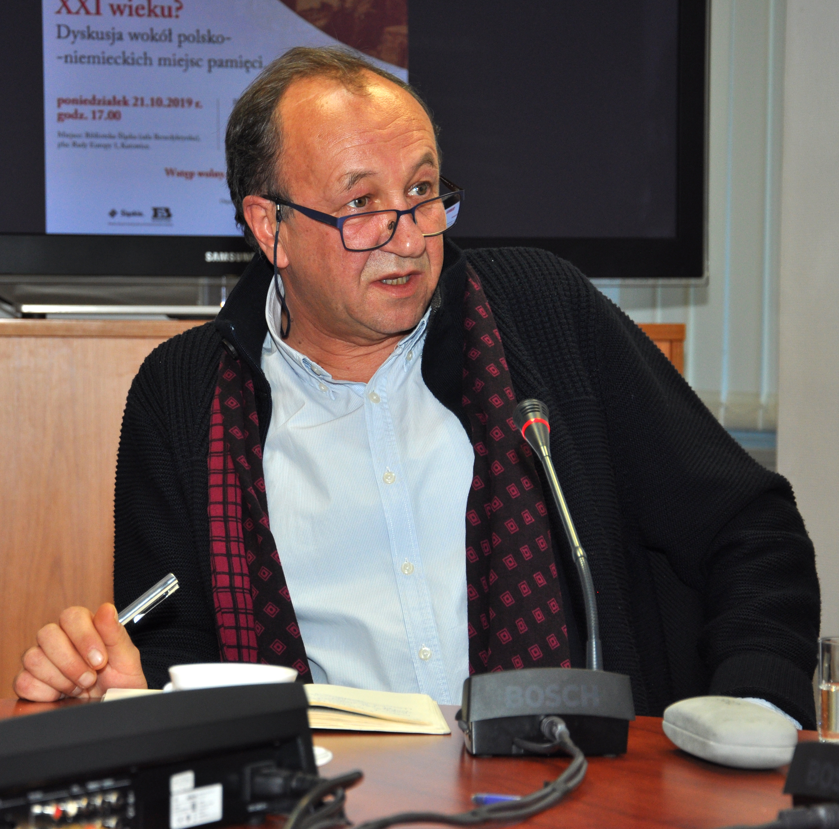 Profesor Robert Traba 2019